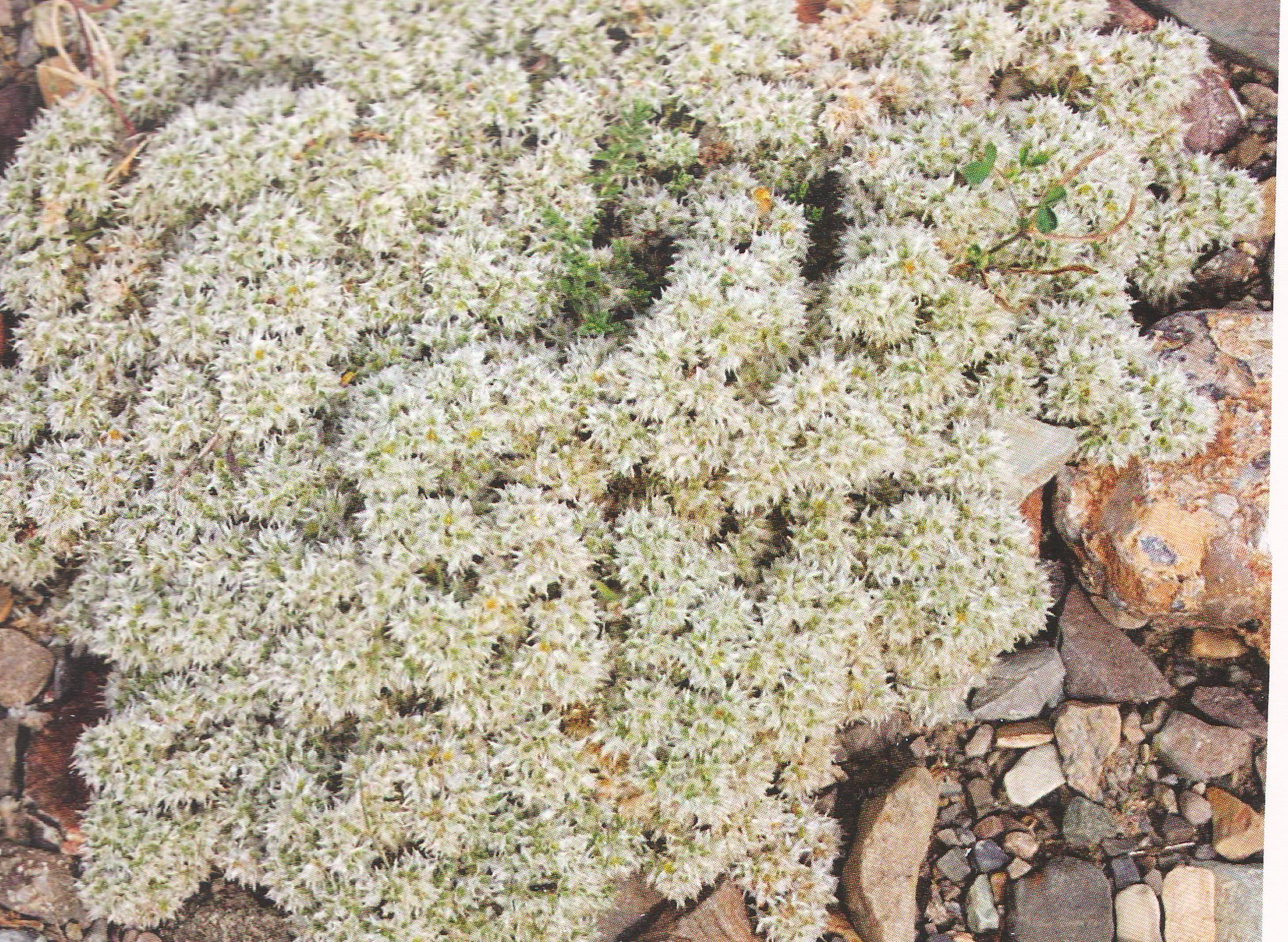 Kürd Köpükotu